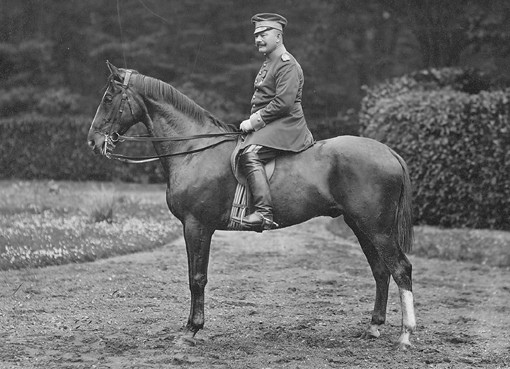 El general de división Pedro Pablo Dartnell (1874-1944) fue un militar chileno y miembro de la junta de gobierno de 1925